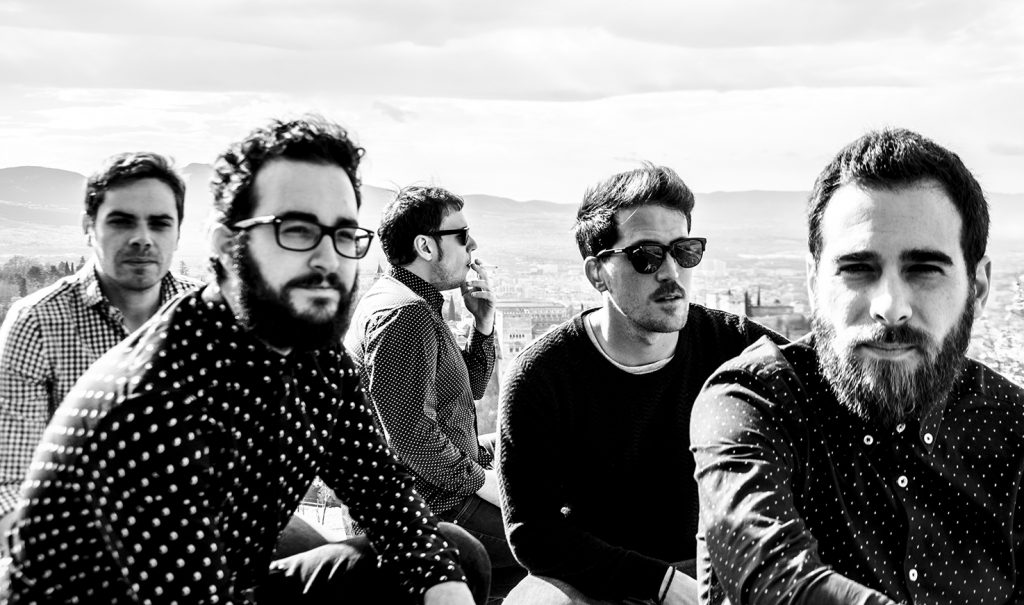 Fotografia de los componentes de la banda granadina de pop/rock Rey Chcio